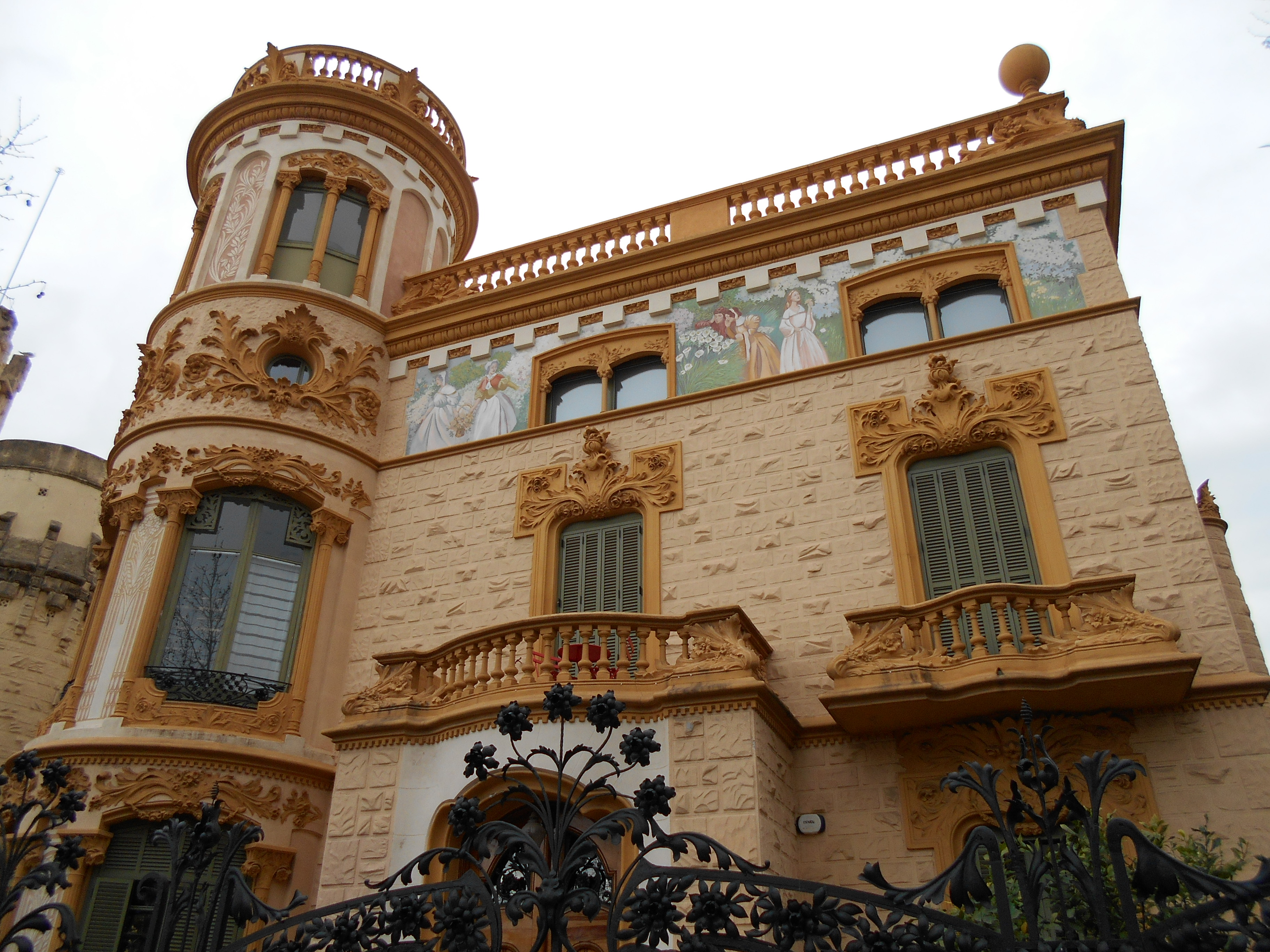 Torre Ignacio Portabella (1905), de José Pérez Terraza.